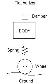 スカイフック理論におけるサスペンション